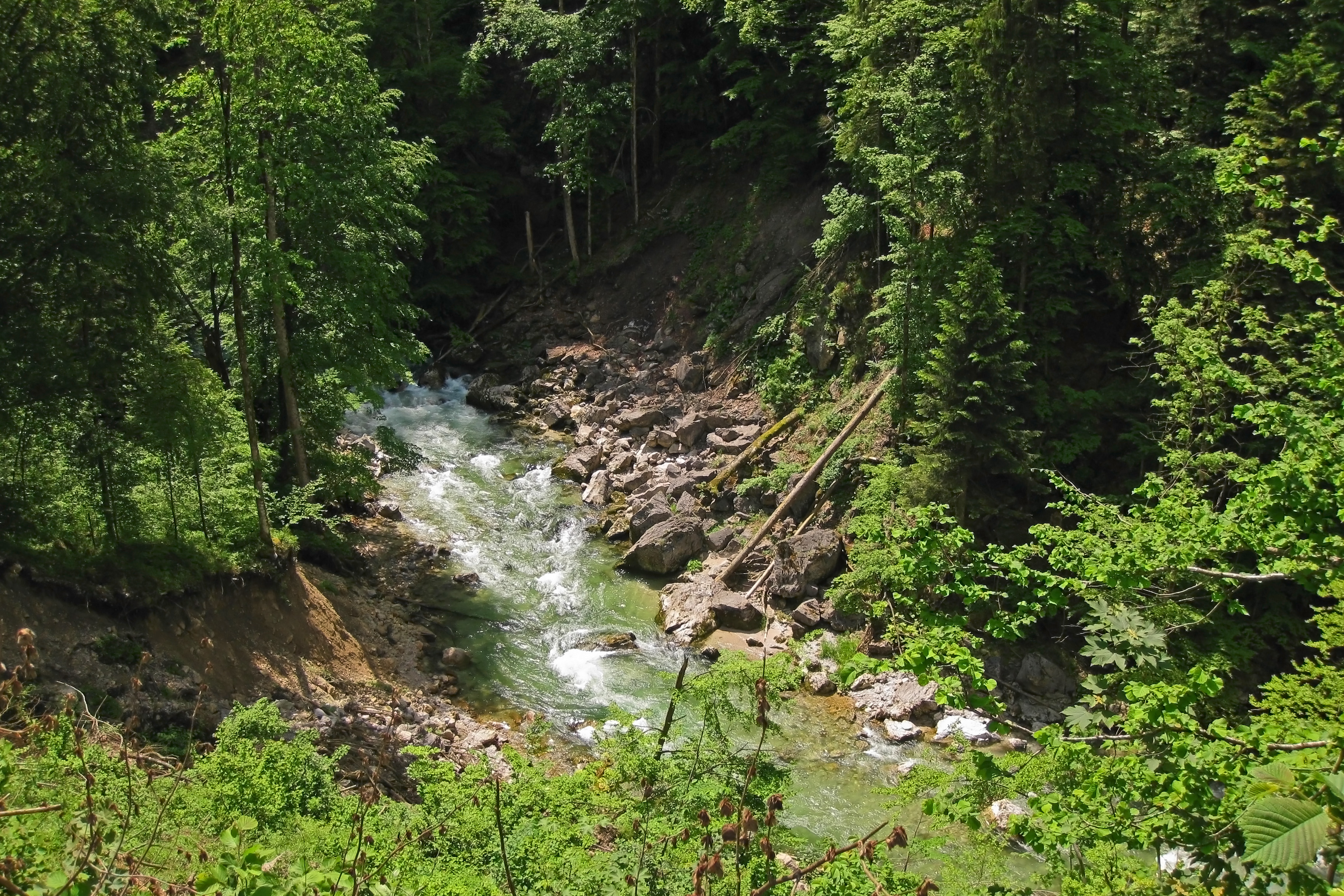 Die große Erlauf in der Vordere Tormäuer im Naturpark Ötscher-Tormäuer.